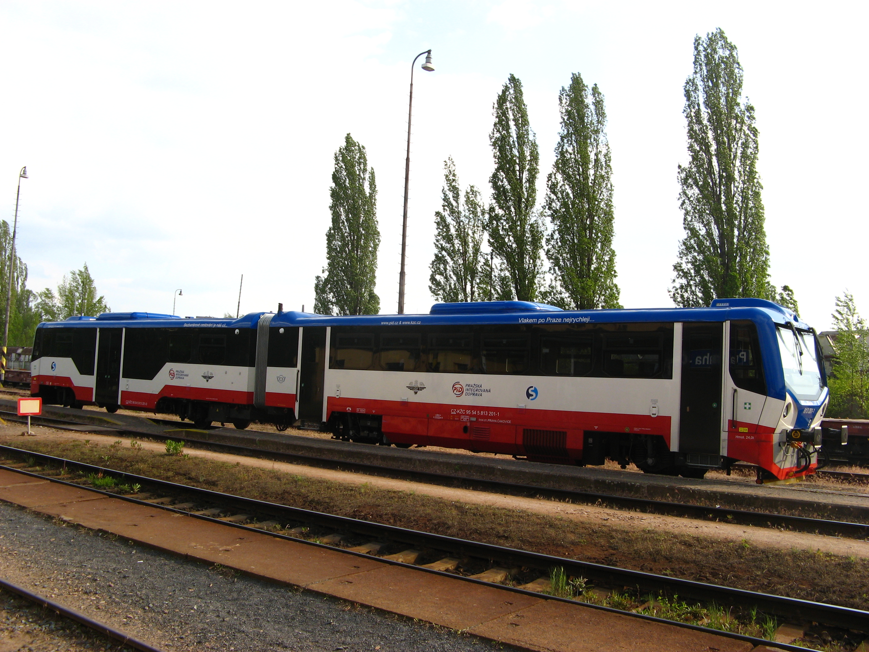 Motorový vůz 813.201 společnosti KŽC doprava ve stanici Praha-Čakovice